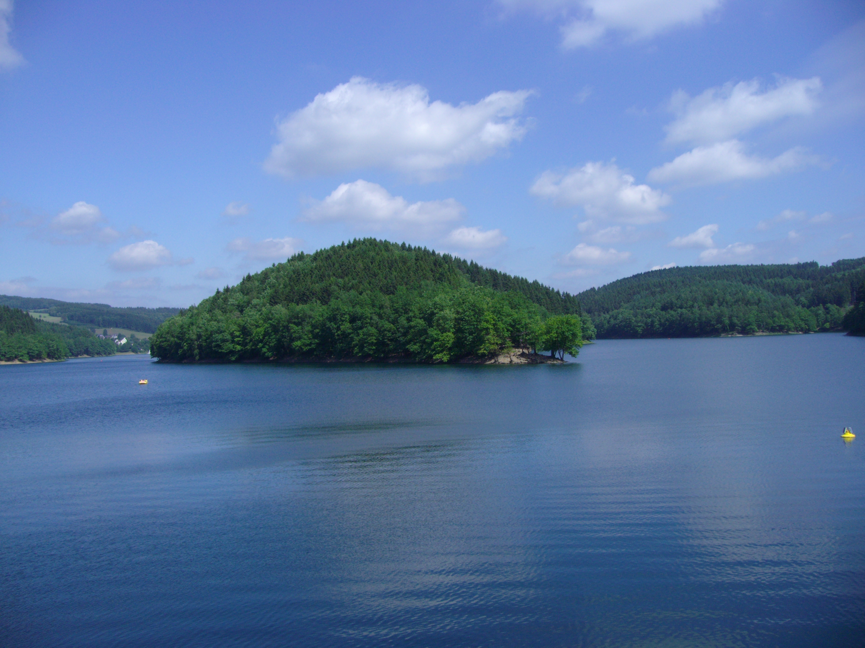 Ansicht der Halbinsel der Aggertalsperre vom Blickpunkt der Sperrmauer.